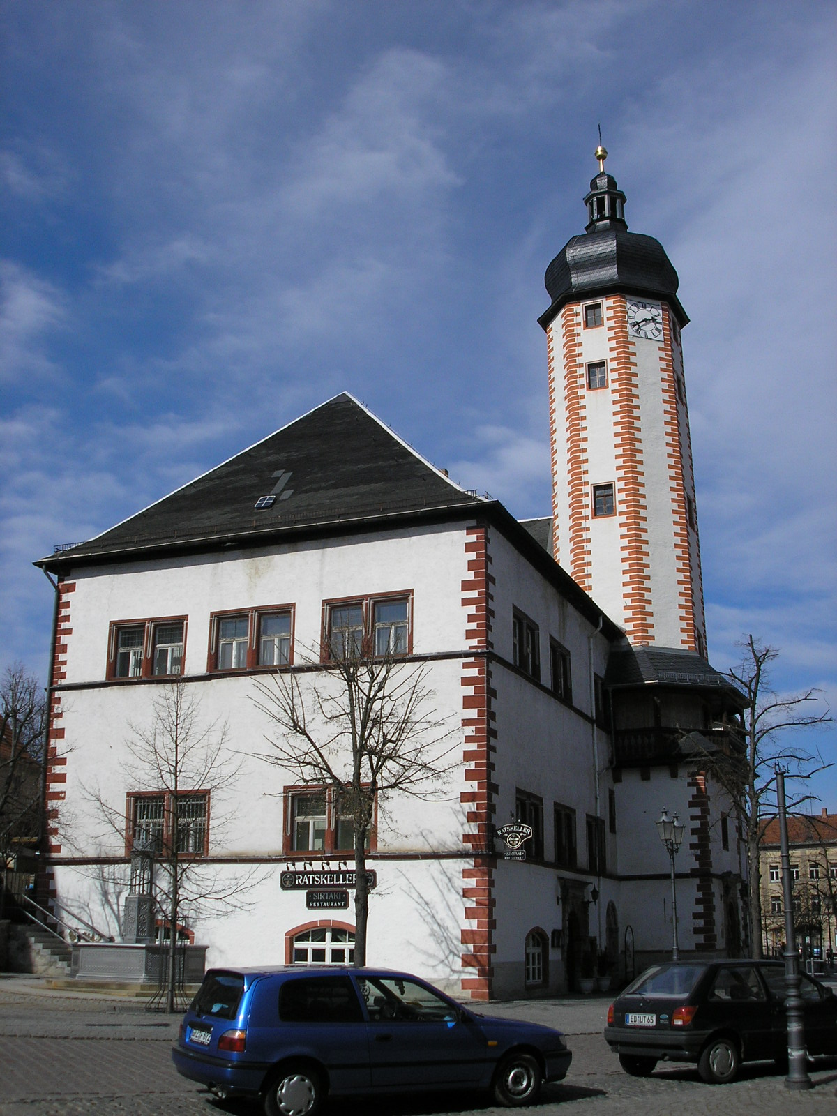 Das Rathaus in Weida (Thüringen)